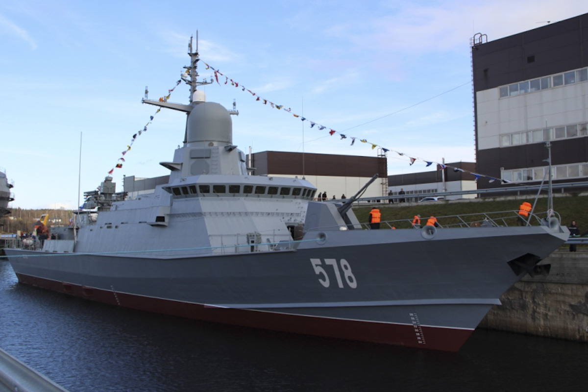 Церемония спуска на воду построенного для Военно-Морского Флота России третьего серийного (четвертого по счету) малого ракетного корабля нового поколения проекта 22800 «Буря» на судостроительном предприятии «Пелла»